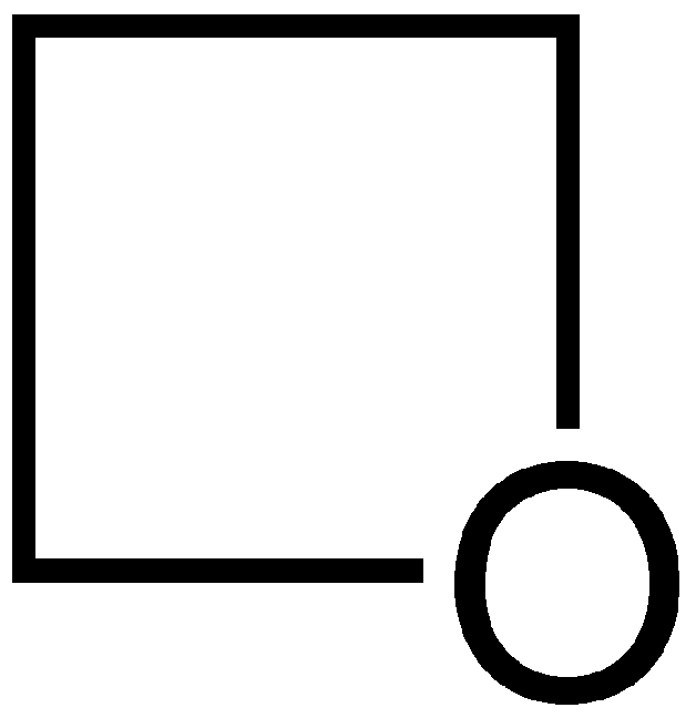 Struktur von Oxetan